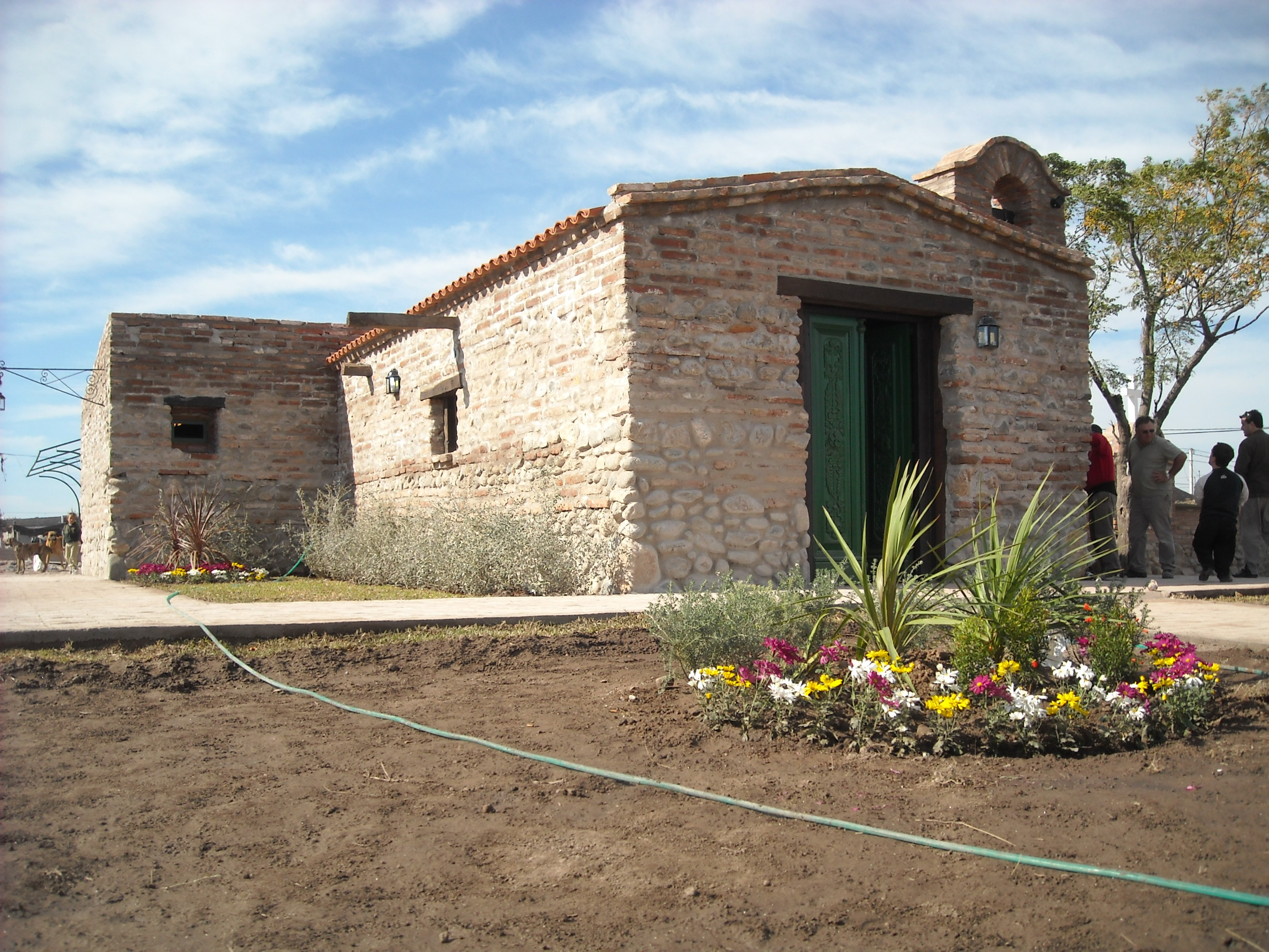 Vista de la Capilla Històrica de San José Obrero recosntruida tras su inauguraciòn en 2011